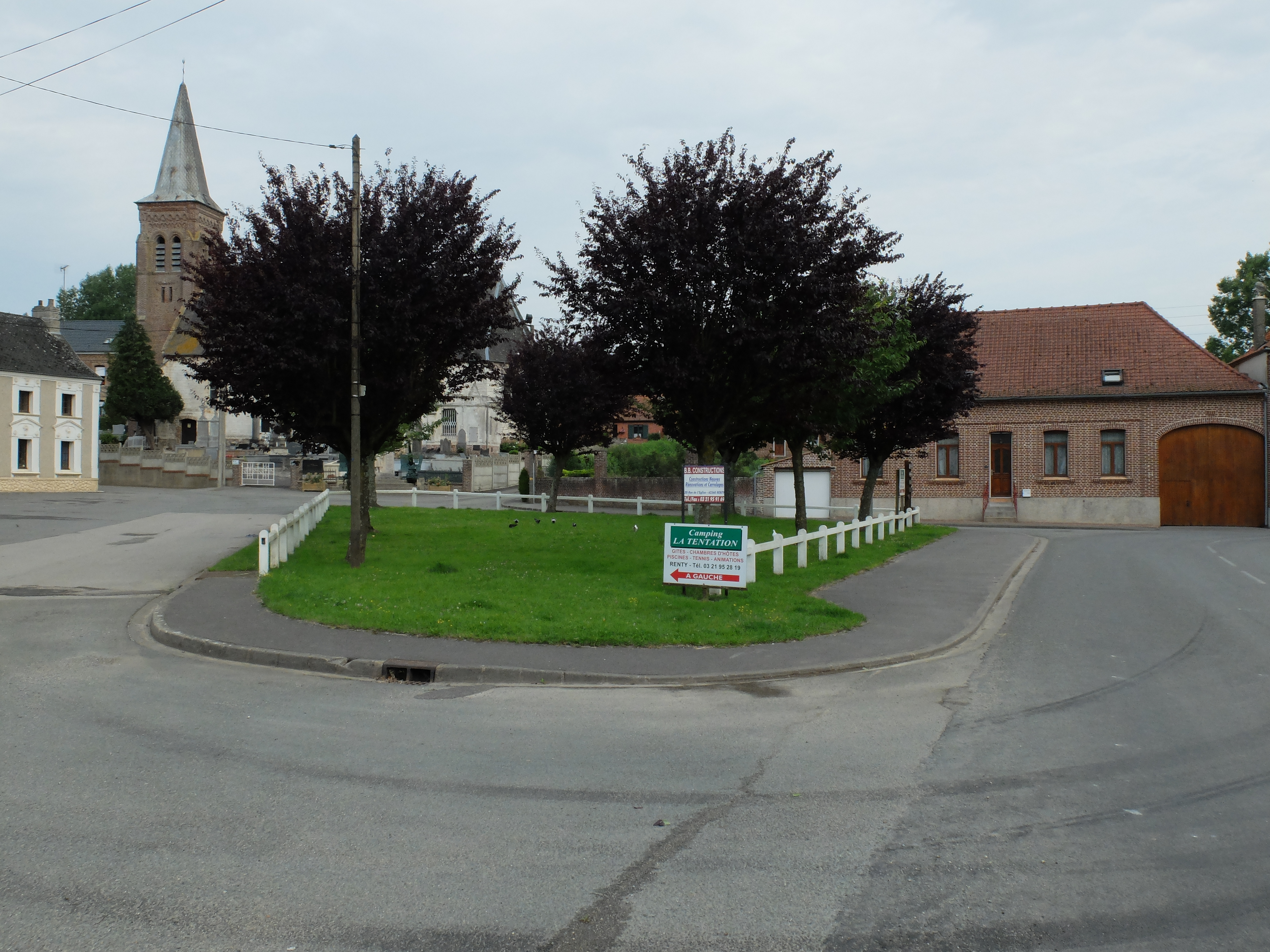 Vue d'une place de Renty.